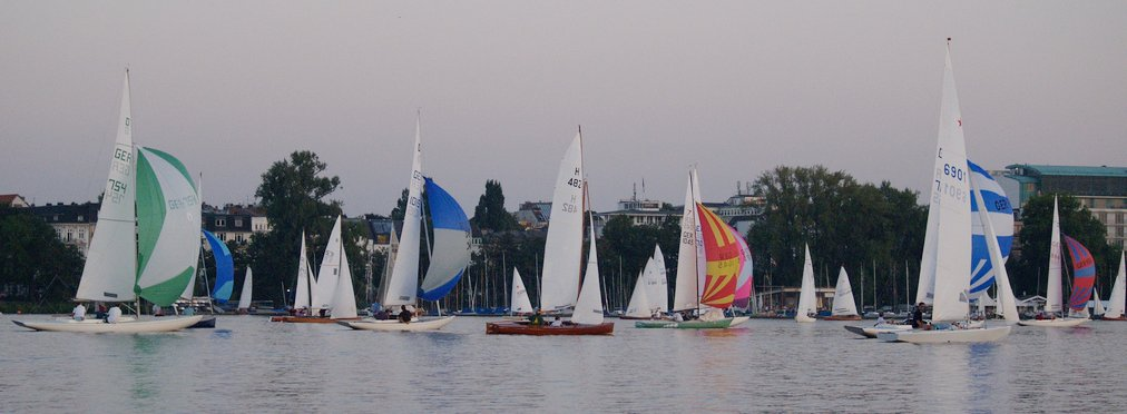 Regattafeld